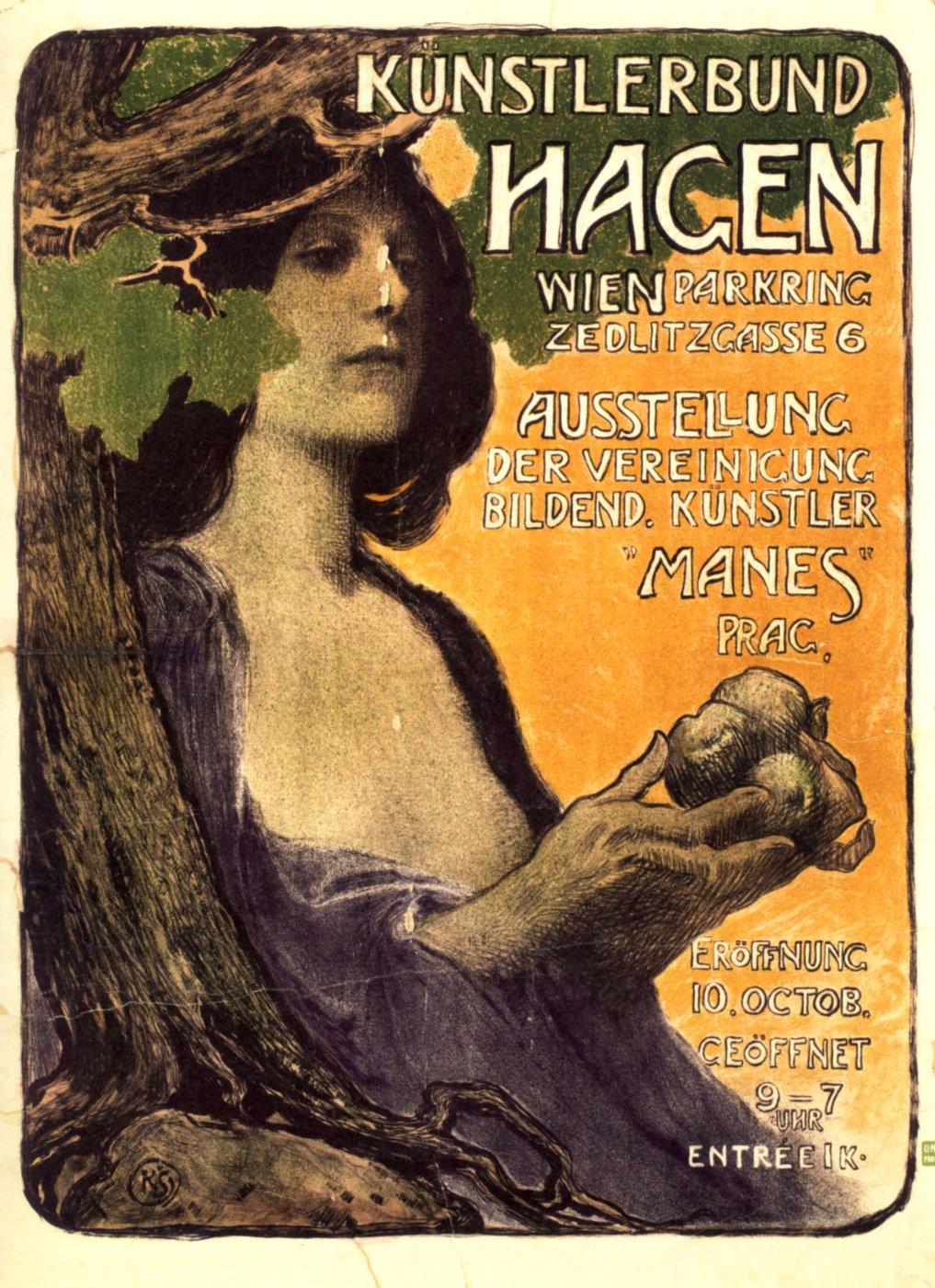 Karel Špillar, Plakat der Mánes-Ausstellung im Hagenbund, Wien 1902 (Prag, Kunstgewerbemuseum)